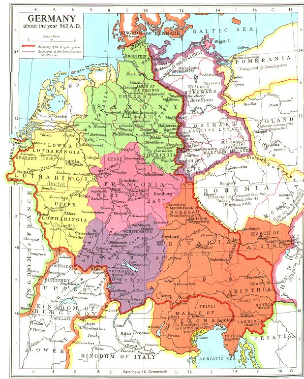 Mapa zobrazuje jednotlivá kmenová vévodství Německa k roku 962.